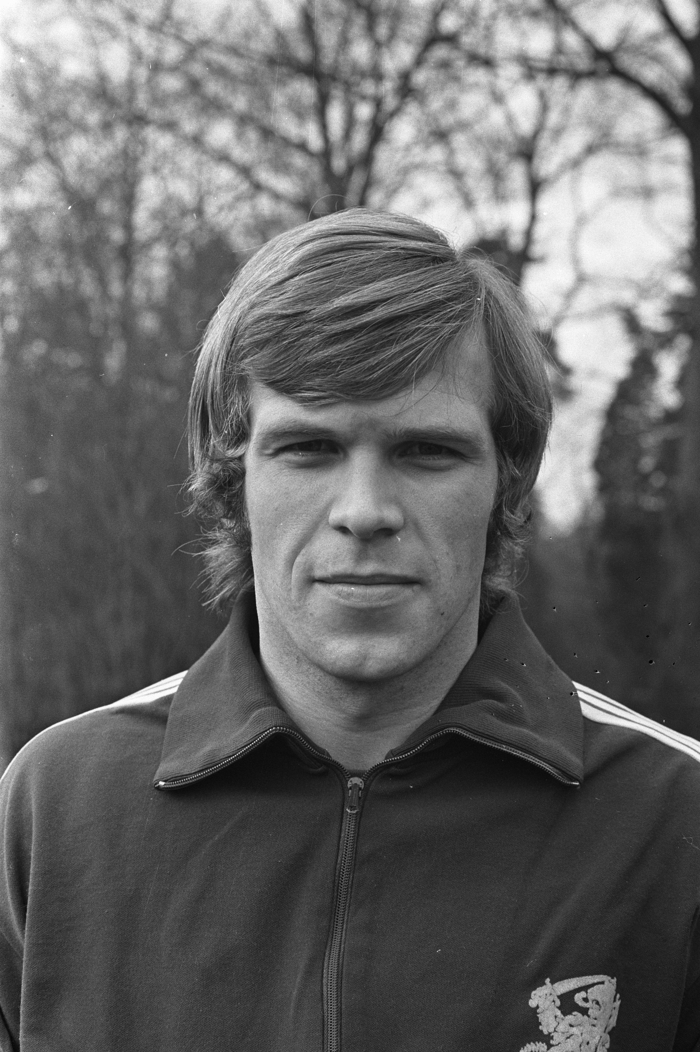 Collectie / Archief : Fotocollectie Anefo Reportage / Serie : [ onbekend ] Beschrijving : Training Nederlands elftal in Zeist voor vriendschappelijke wedstrijd tegen Griekenland; Theo de Jong Datum : 8 februari 1972 Locatie : Griekenland, Zeist Trefwoorden : sport, voetballers Fotograaf : Mieremet, Rob / Anefo Auteursrechthebbende : Nationaal Archief Materiaalsoort : Negatief (zwart/wit) Nummer archiefinventaris : bekijk toegang 2.24.01.05 Bestanddeelnummer : 925-3701